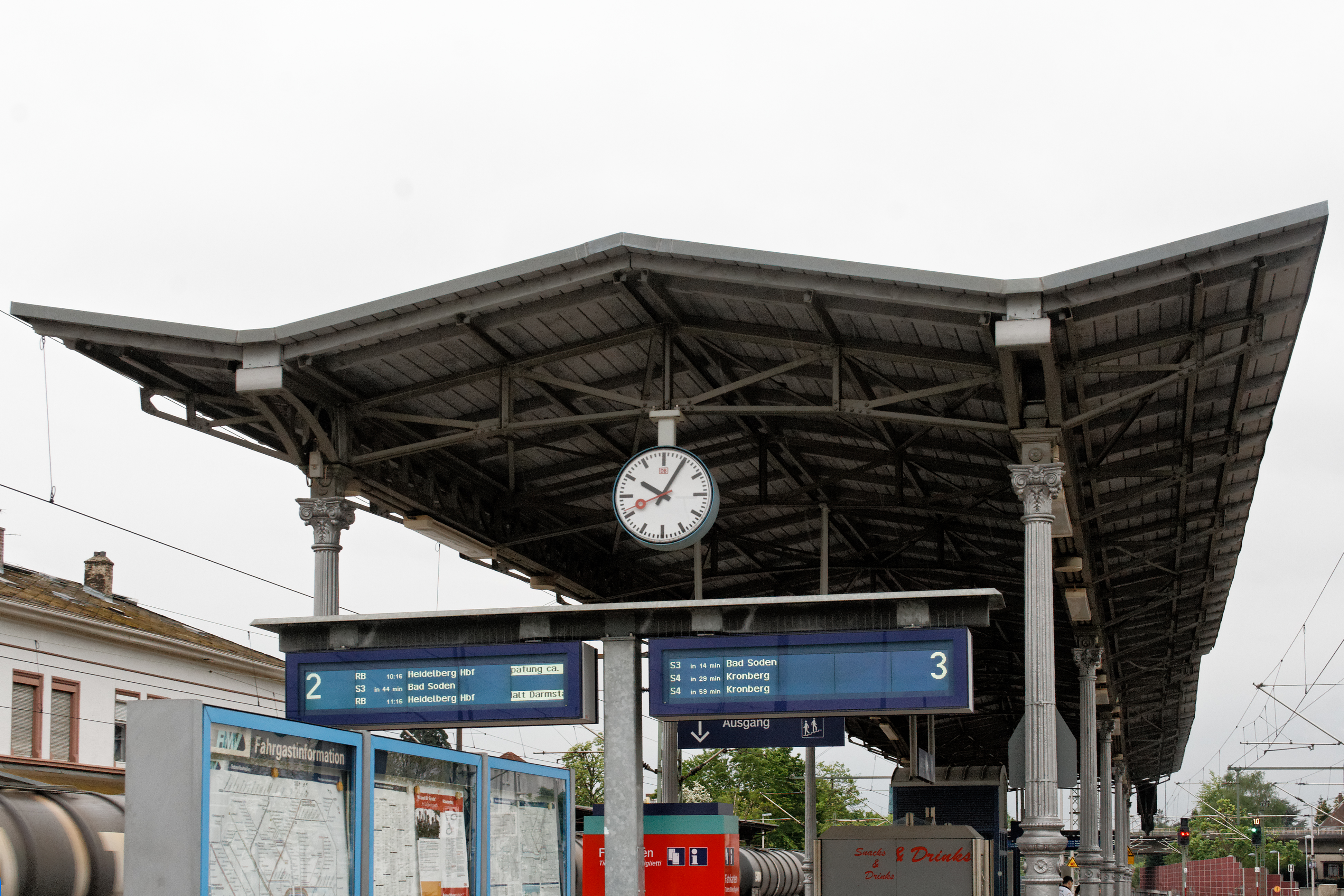 Bahnsteigdach am Bahnhof Langen (Hessen). Eisenkonstruktion auf gusseisernen Säulen.